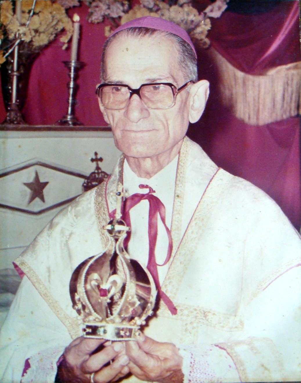 O Bispo brasileiro de Campos dos Goytacazes, RJ, Dom Antônio de Castro Mayer, na cerimônia de coroação da Imagem Peregrina de Nossa Senhora de Fátima em sua visita a Diocese de Campos em 1973, a cerimônia ocorreu após a missa, por isso Dom Mayer está usando os paramentos próprios para celebrá-la (é evidente a casula, a alva, o amito e o manípulo), e segurando a coroa de Maria.